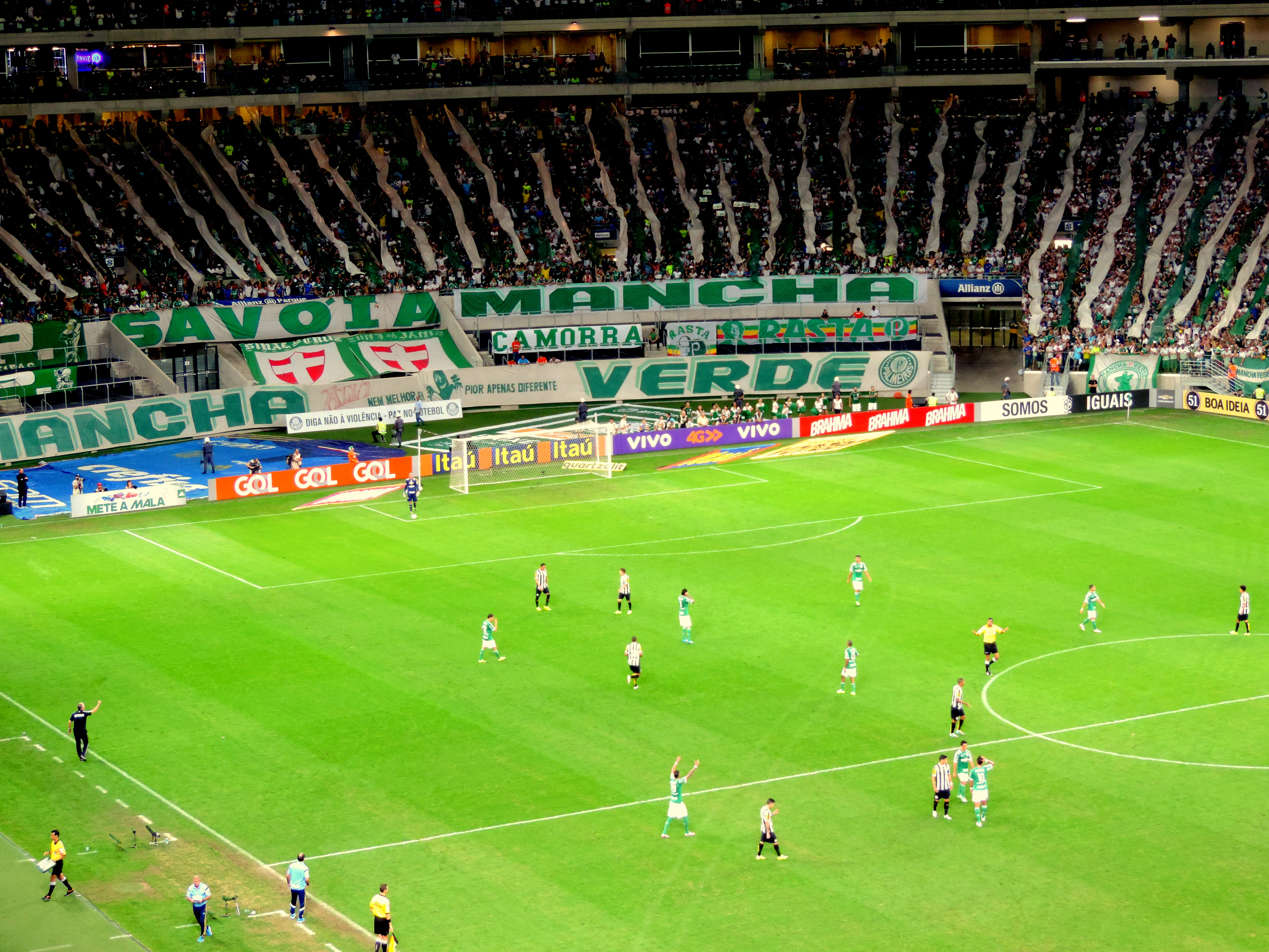 Foto: Roberto Sabino